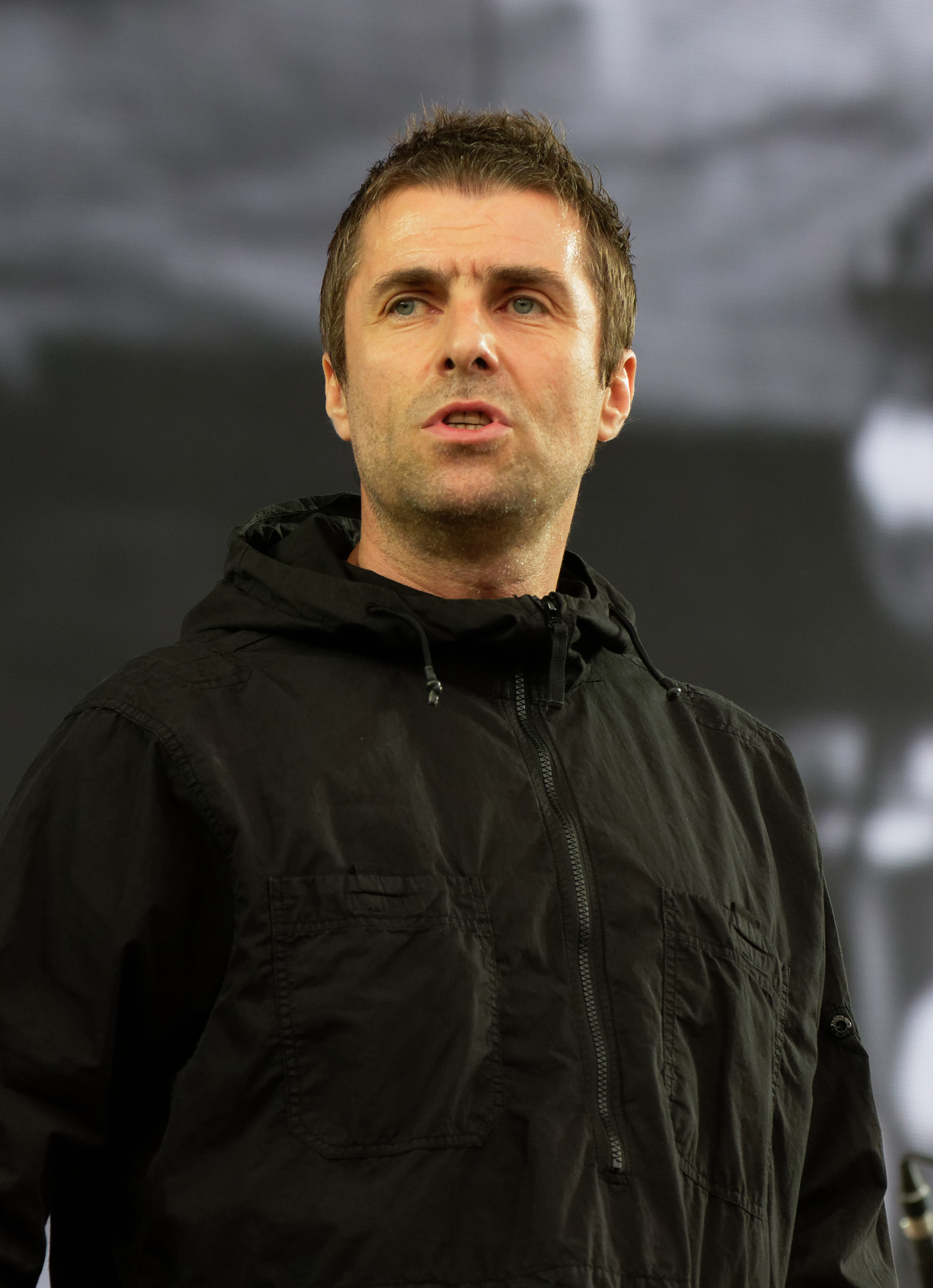 Liam Gallagher en concert lors du festival des vieilles charrues 2018.